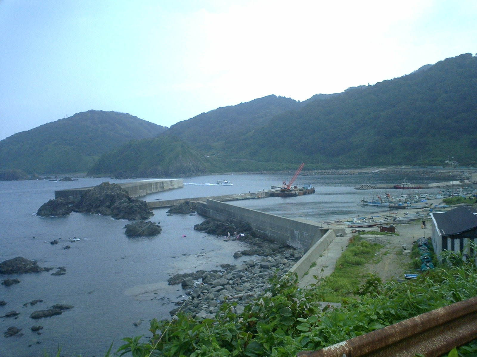 Kamaya Area (in Awashima) - 釜谷地区（粟島浦村）